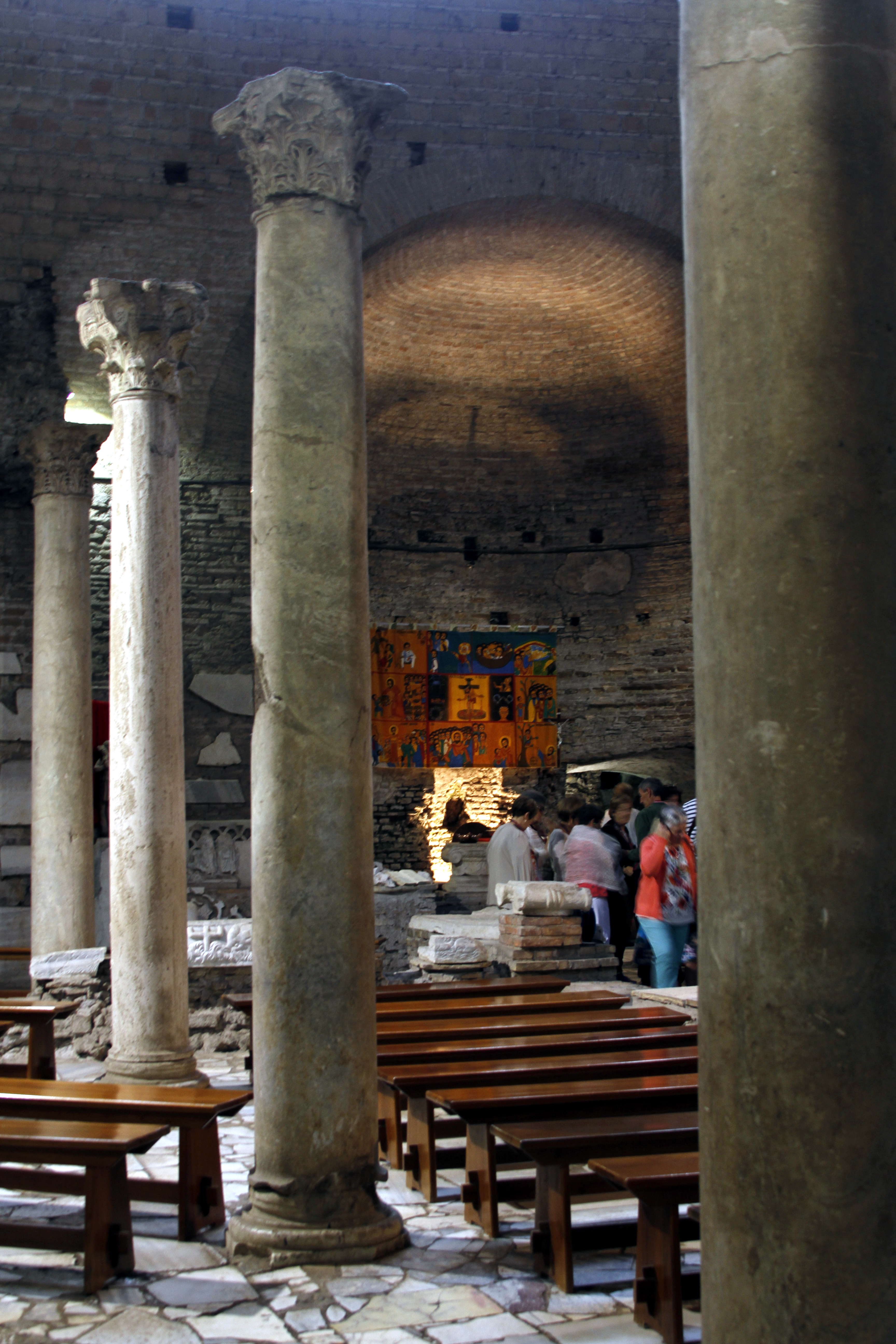 Catacombs of Domitilla - Rome